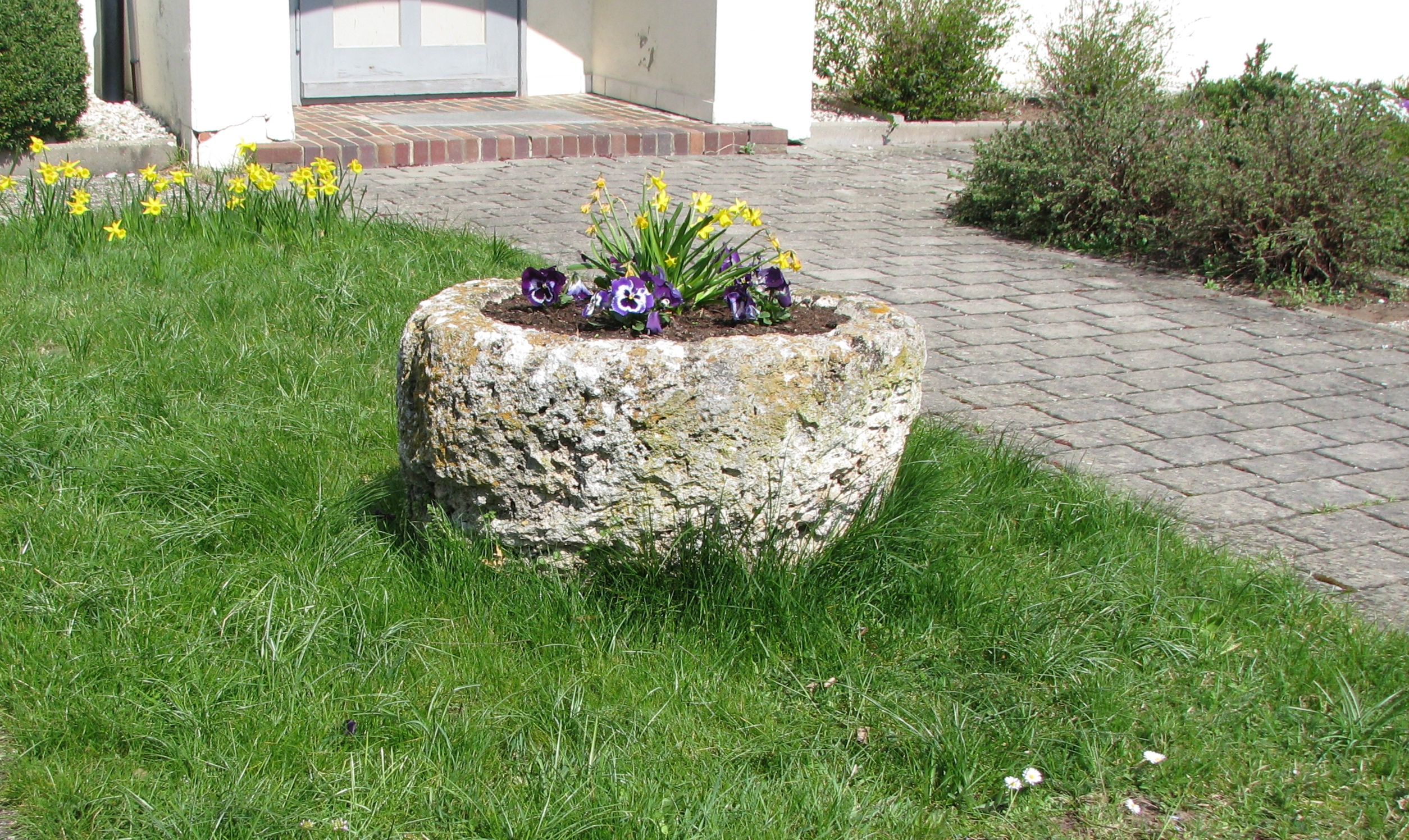 Kerkhofen, Ortsteil von Mühlhausen im Landkreis Neumarkt in der Oberpfalz, altes Steinbecken an der evangelischen Pfarrkirche St. Othmar